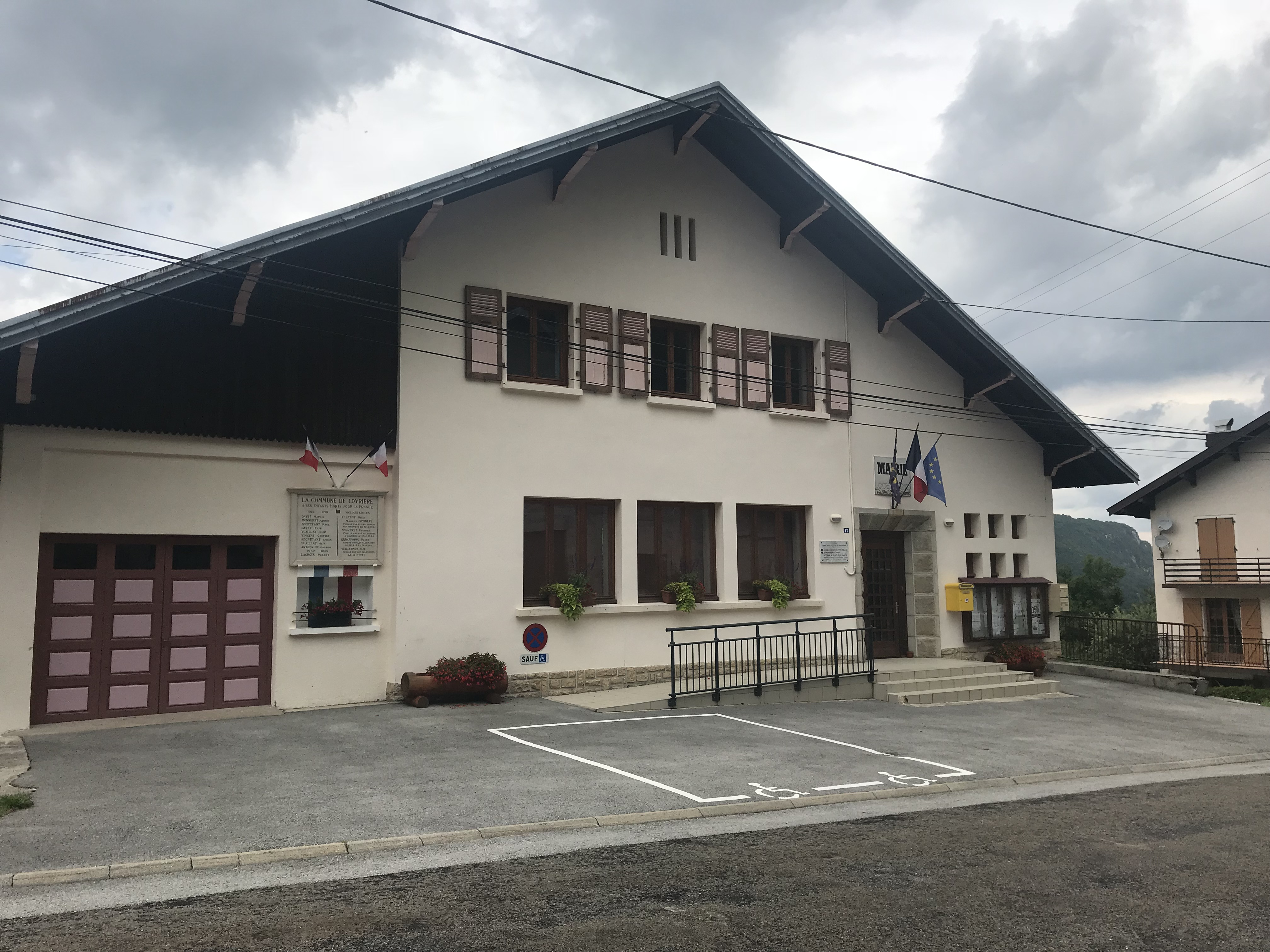 Image de Coyrière en juillet 2018.